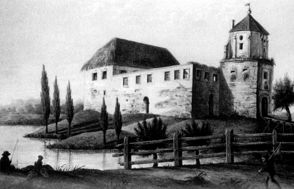 Zamek w Besiekierach w 1 połowie XIX wieku, akwarela autorstwa Kazimierza Stronczyńskiego